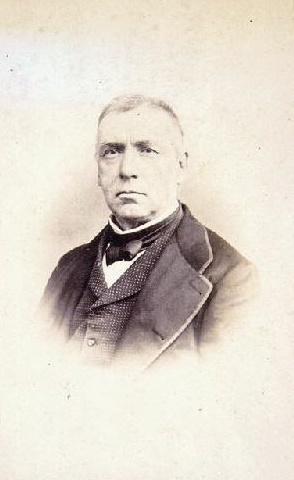 José María Orense, fotografía de J. Laurent. Museo de Historia de Madrid